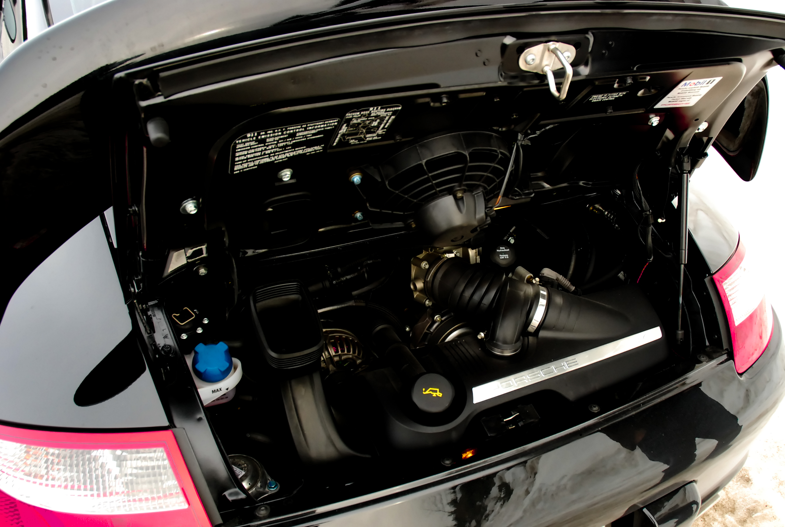 Moteur Flat-6 d'une Porsche 911 (997) Carrera